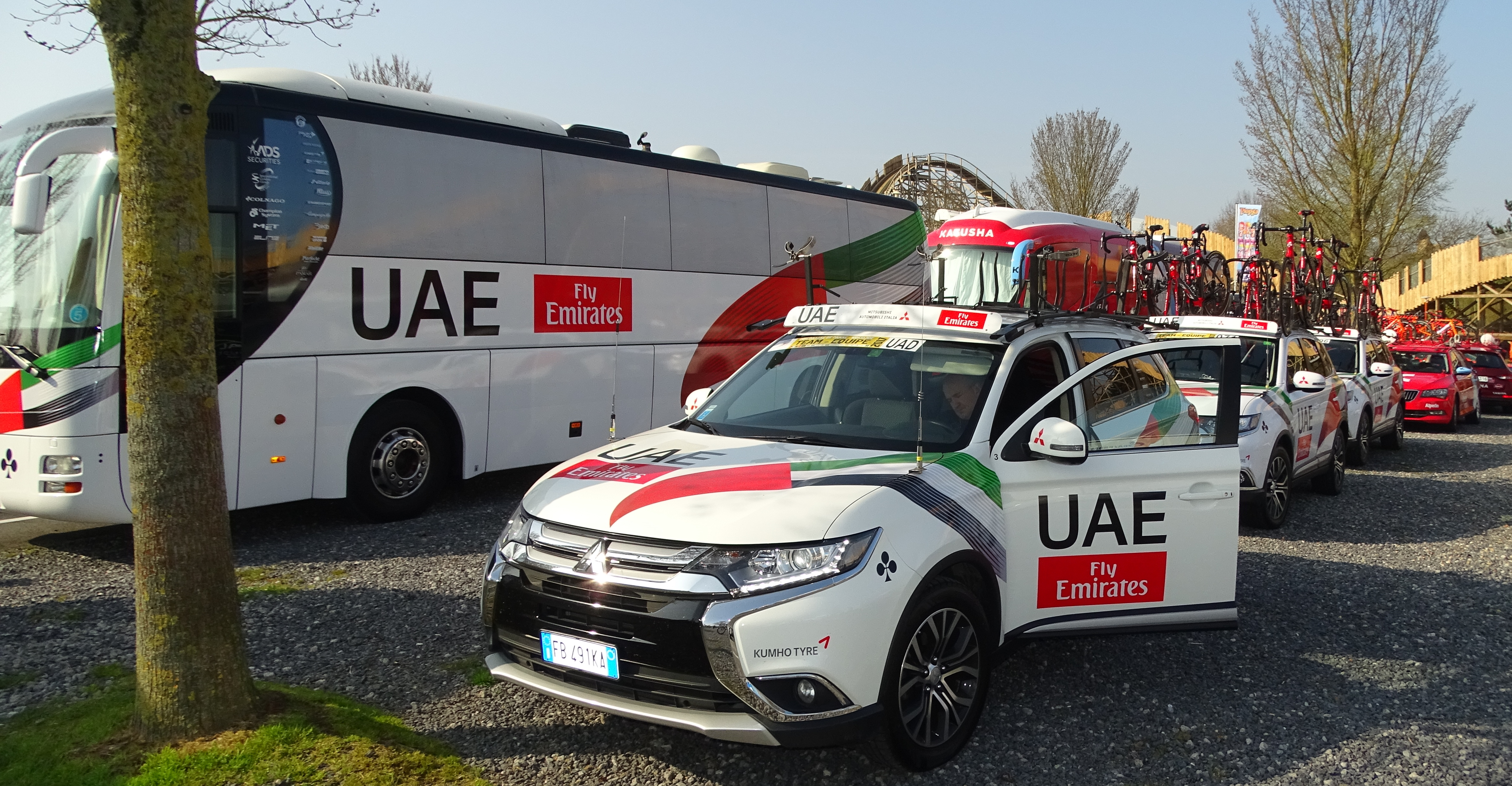 Reportage réalisé le mardi 28 mars à l'occasion de du départ de la première étape des Trois jours de La Panne 2017 à Adinkerque (La Panne), Belgique.